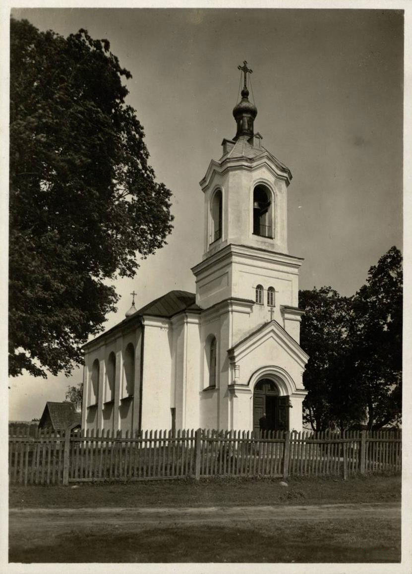 Беларуская (тарашкевіца): Цудзенішкі (Cudzieniški). Касьцёл